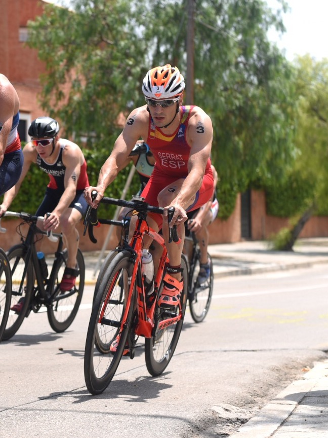 Competició de triatló en els Jocs del Mediterrani